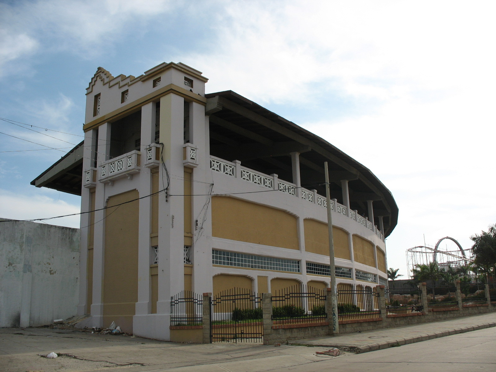 Estadio Romelio Martínez